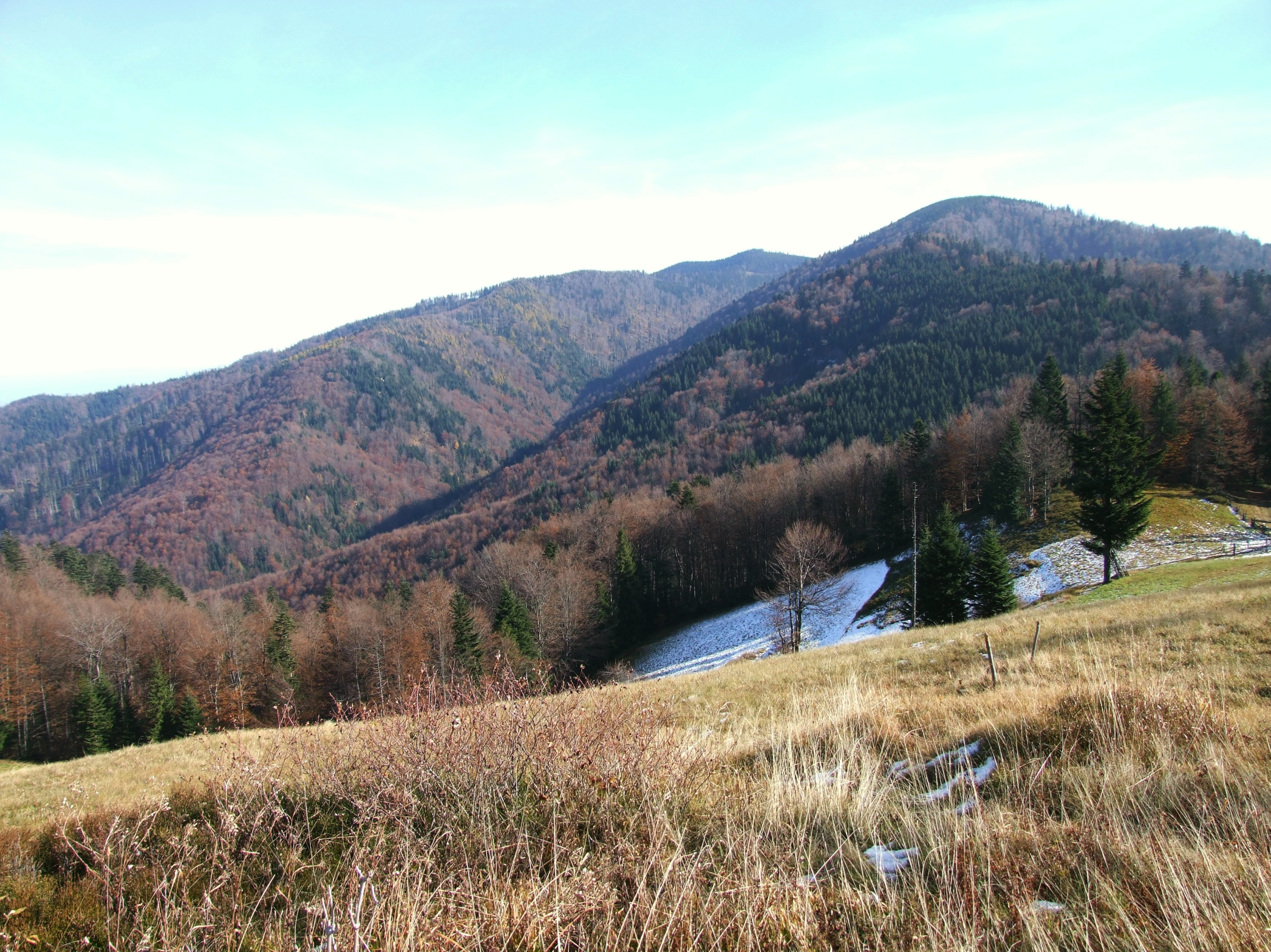 Widok z Herślowej Polany. U góry szczyty Jasiennik i Skałka, pomiędzy nimi dolina Majdańskiego Potoku